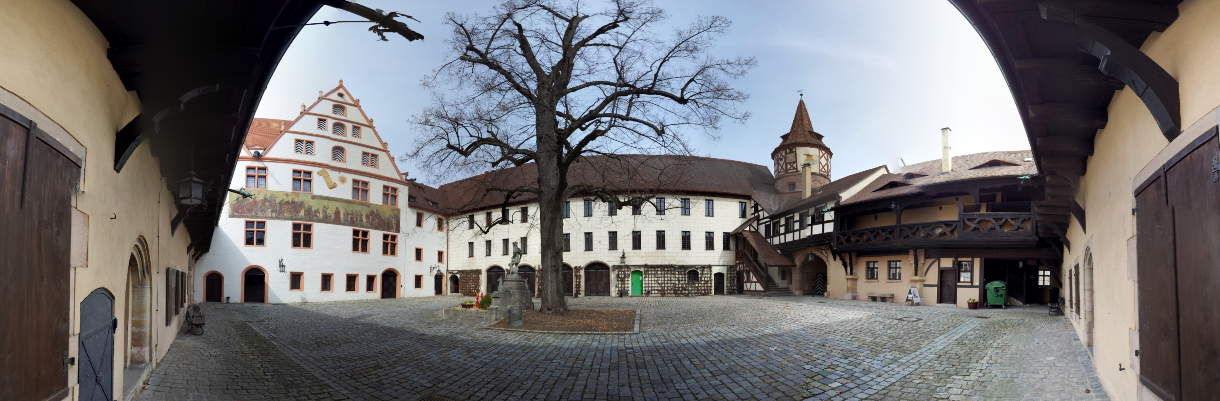 Schloss Ratibor Roth Innenhof aufgenommen mit der Photosphere Funktion von Android